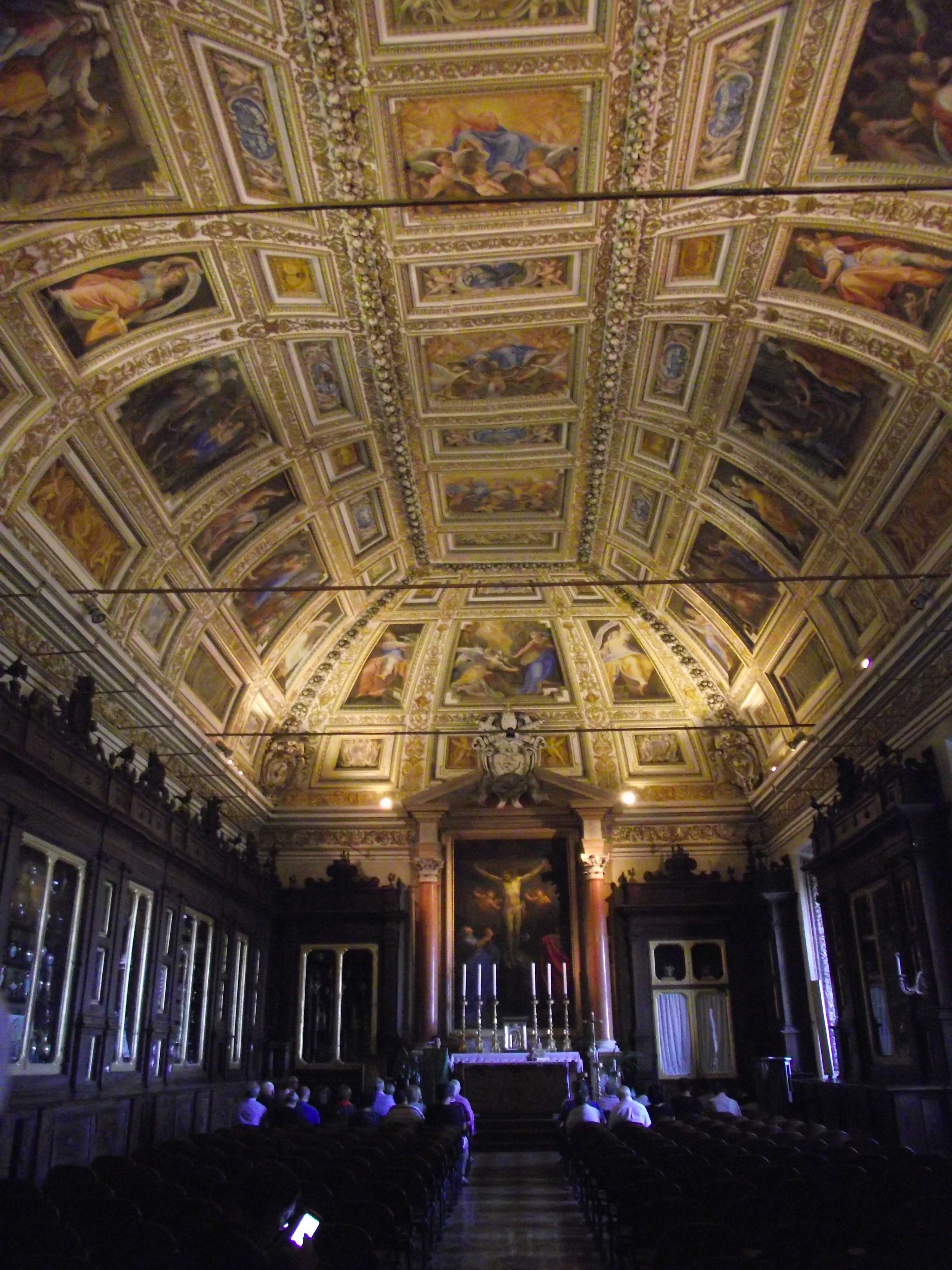 Loreto, Basilica della Santa Casa